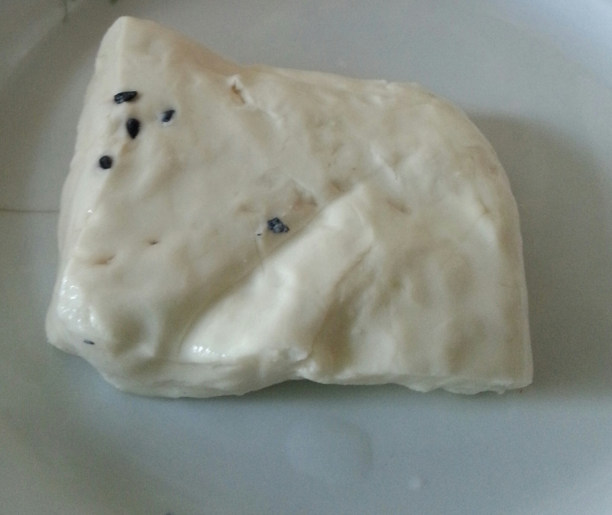 جبنة نابلسية عليها حبة البركة أو السمسم الأسود